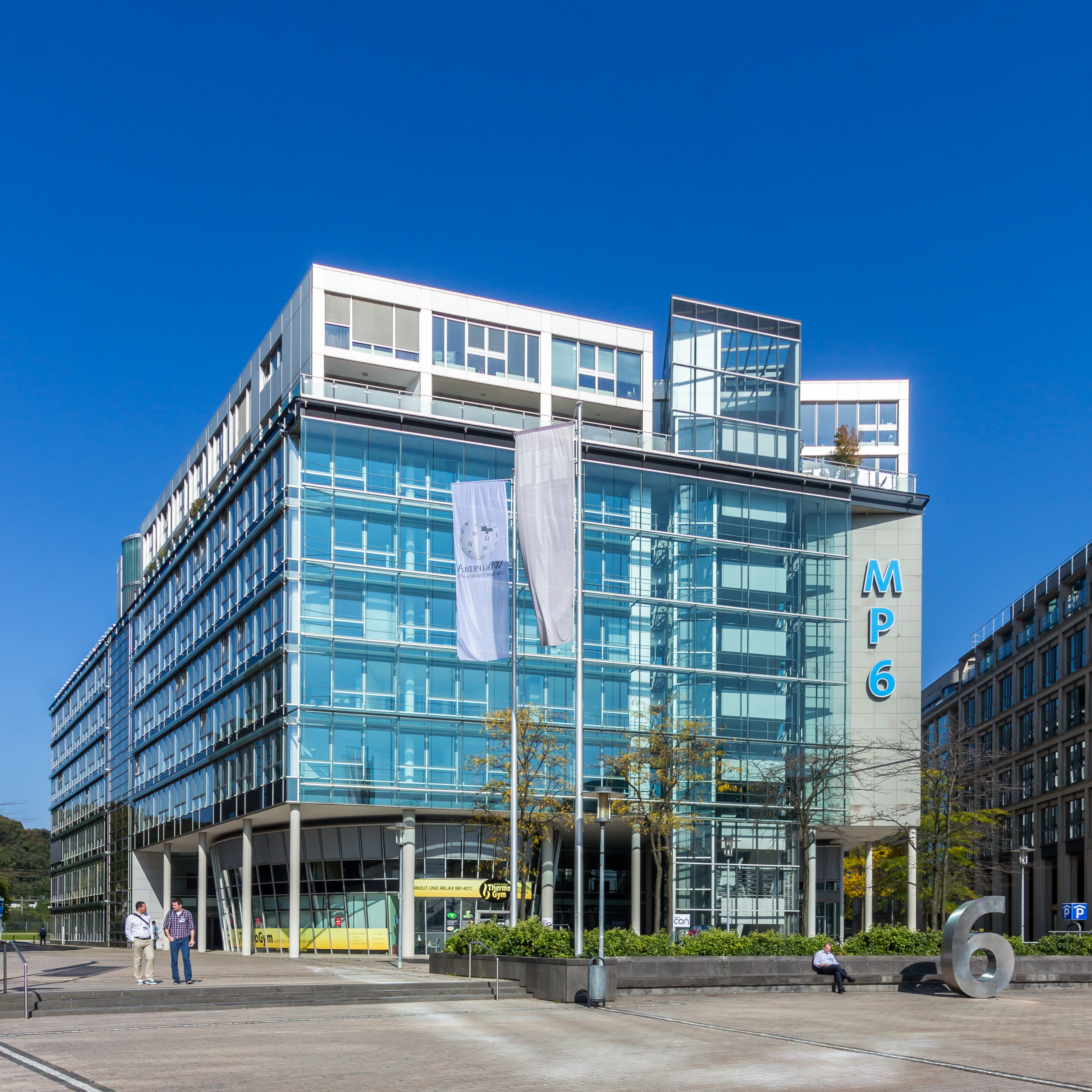 MediaPark Köln, Haus 6